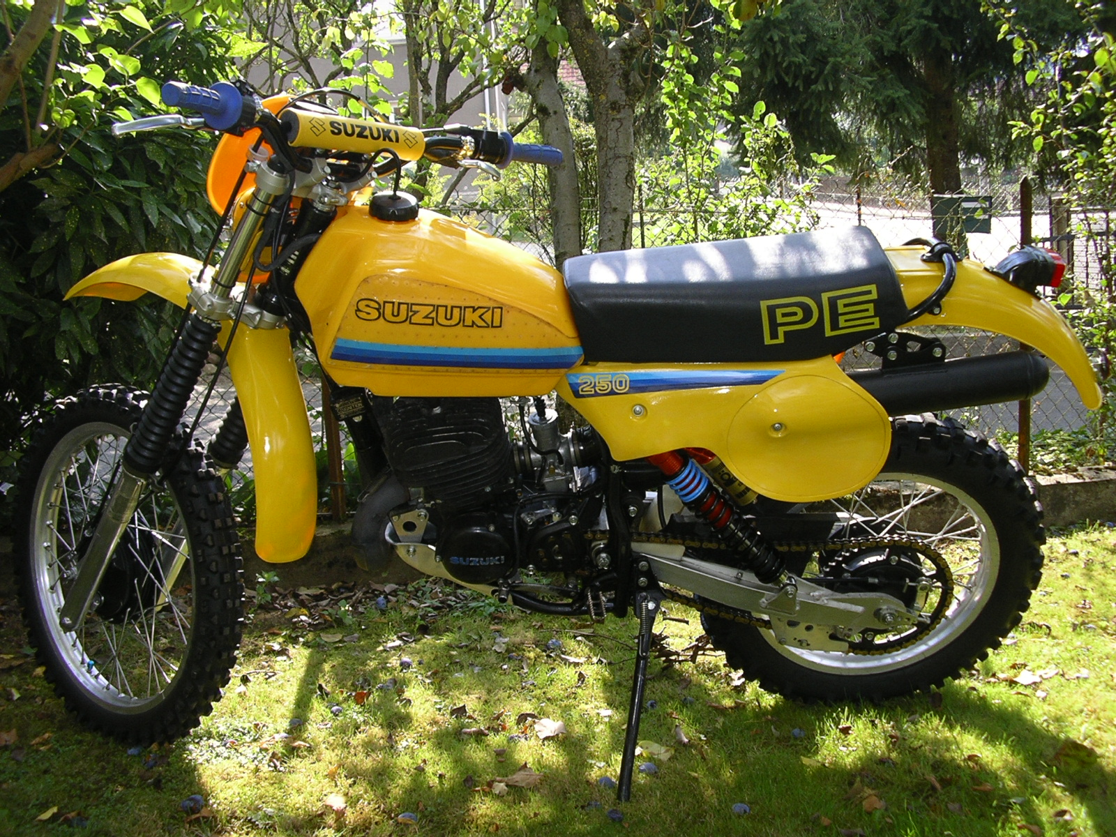 photo de ma suzuki PE250 T